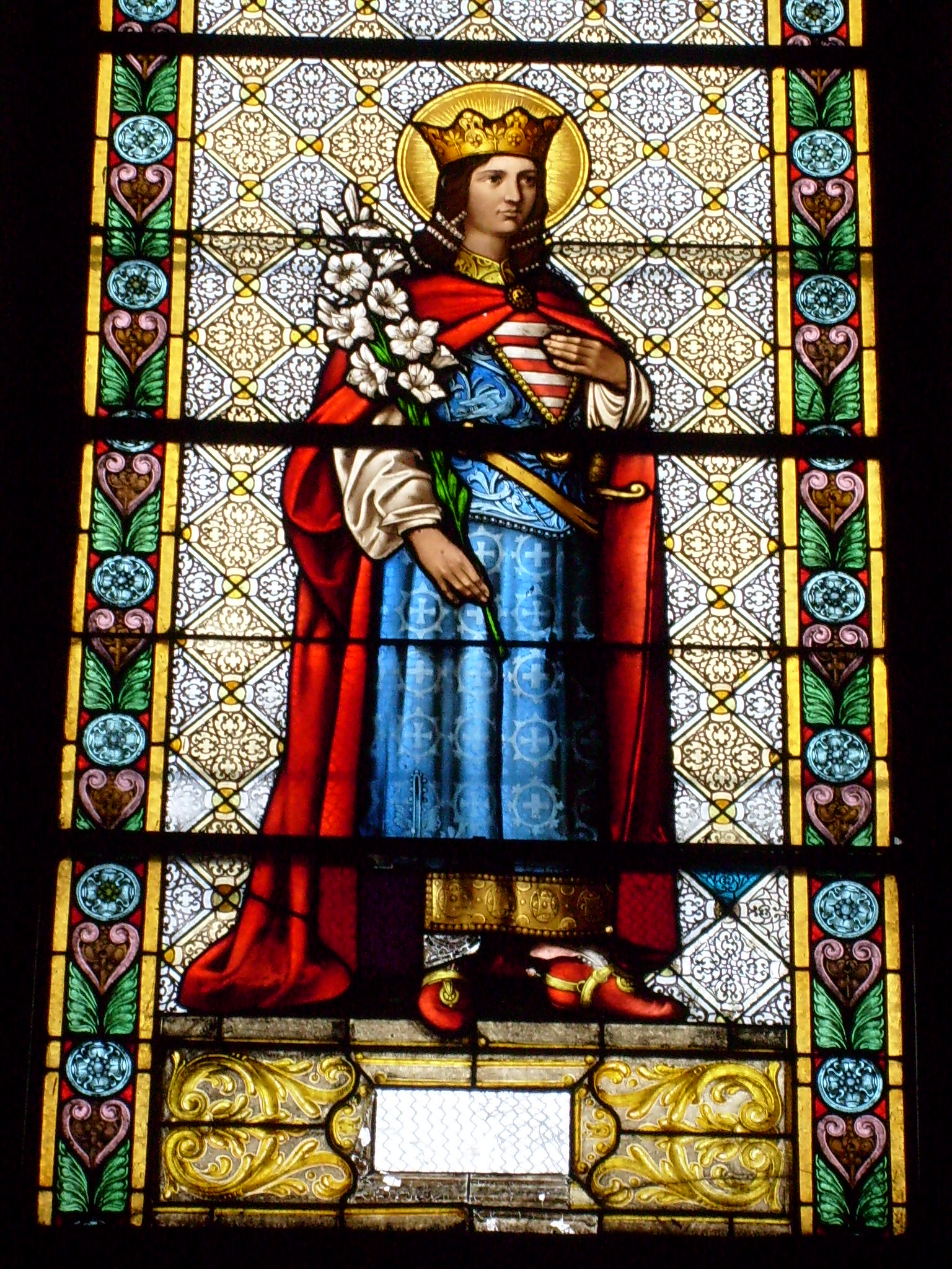 Vitraliu din Biserica Minoriţilor (Catedrala Schimbarea la Faţa) din Cluj, reprezentandu-l pe Sf. Emeric.